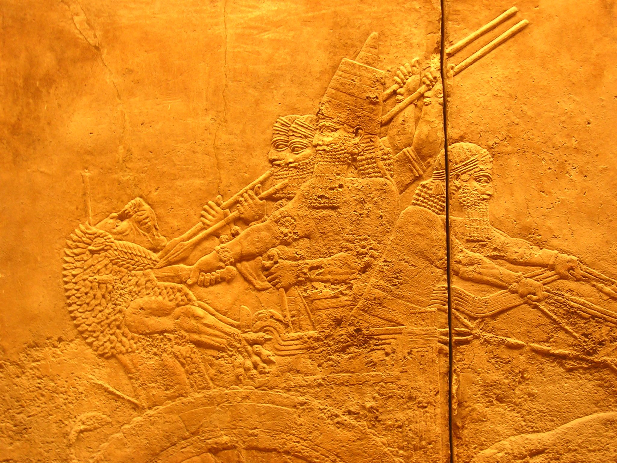 Palazzo di Nimrud: bassorilievo "Caccia al leone"